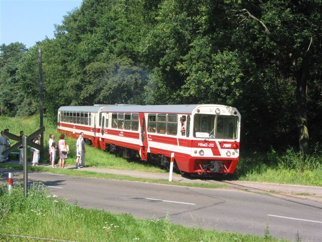 Pociąg Żuławskiej Kolei Dojazdowej prowadzony przez wagon motorowy MBxd2-212 relacji Mikoszewo Ujście Wisły - Sztutowo